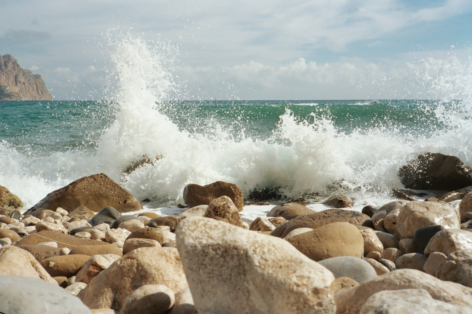 Gischt an der Küste von Calpe (links ist der Peñon de Ifach noch zu erkennen)